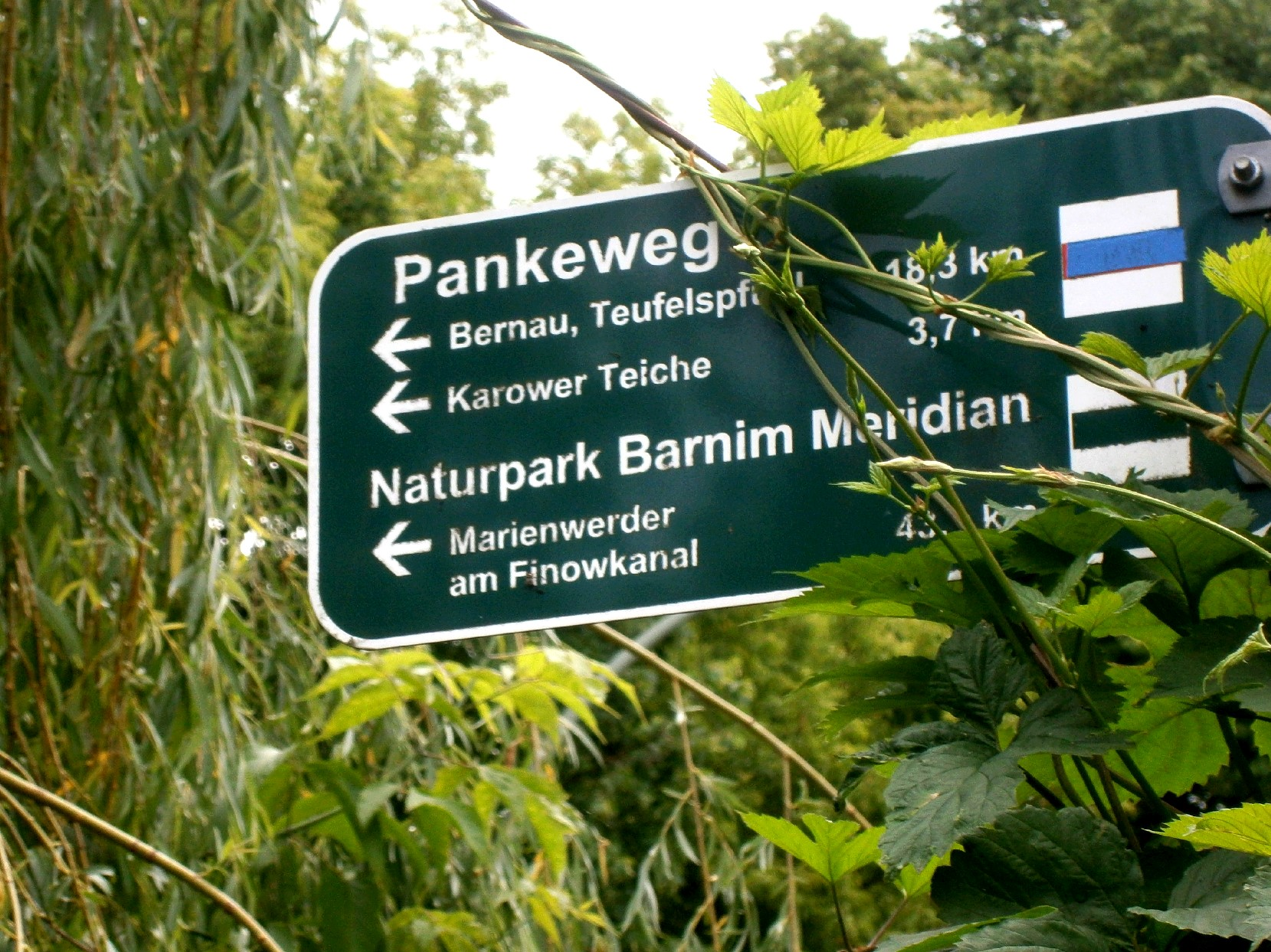 Der Nord-Süd-Weg mit der Markierung 05 ist einer der 20 grünen Hauptwege Berlins, die als Wanderwege duch die Großstadt Parks und Siedlungsfläche verbinden.